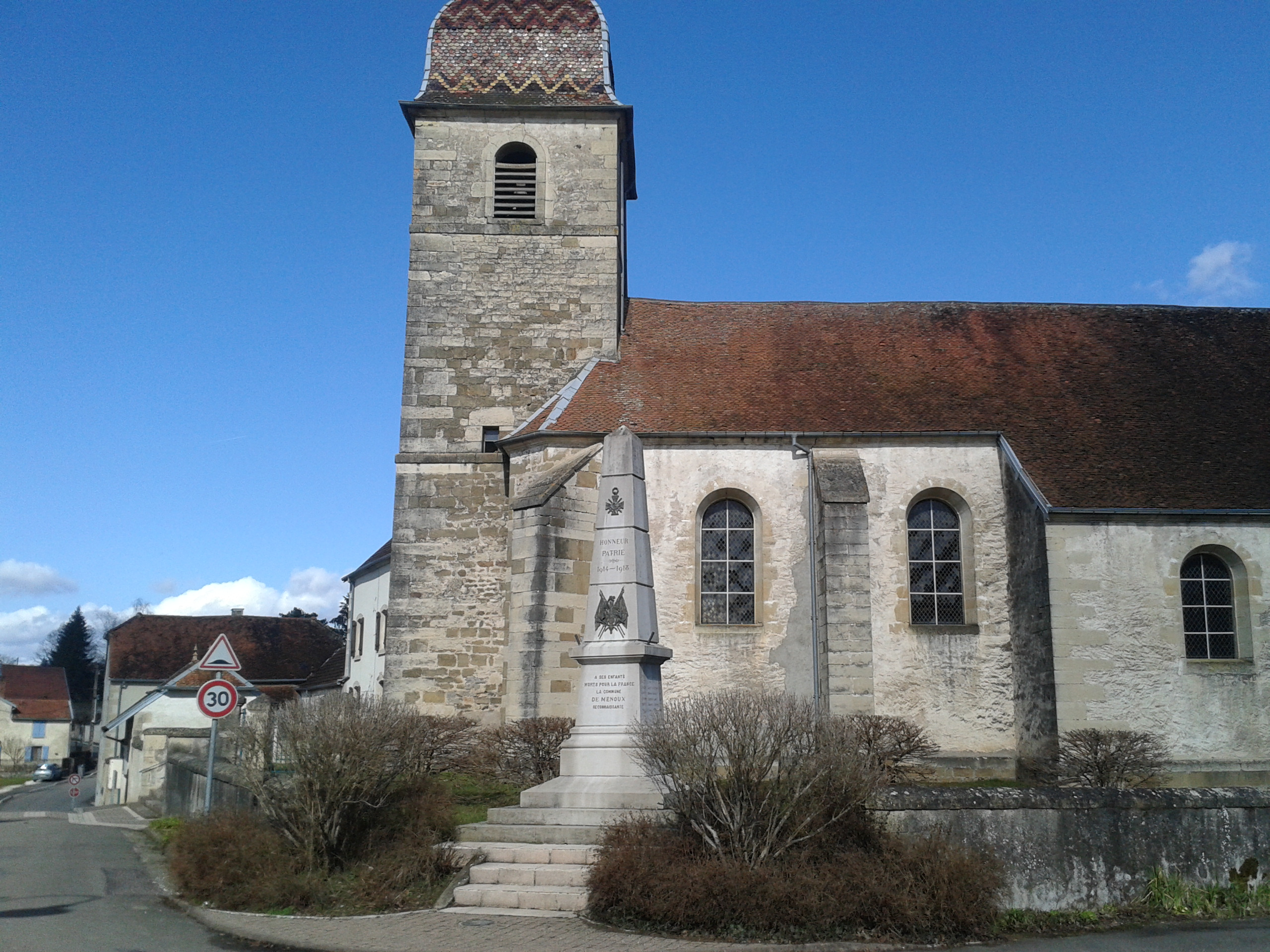 L'église de Menoux (Haute-Saône)